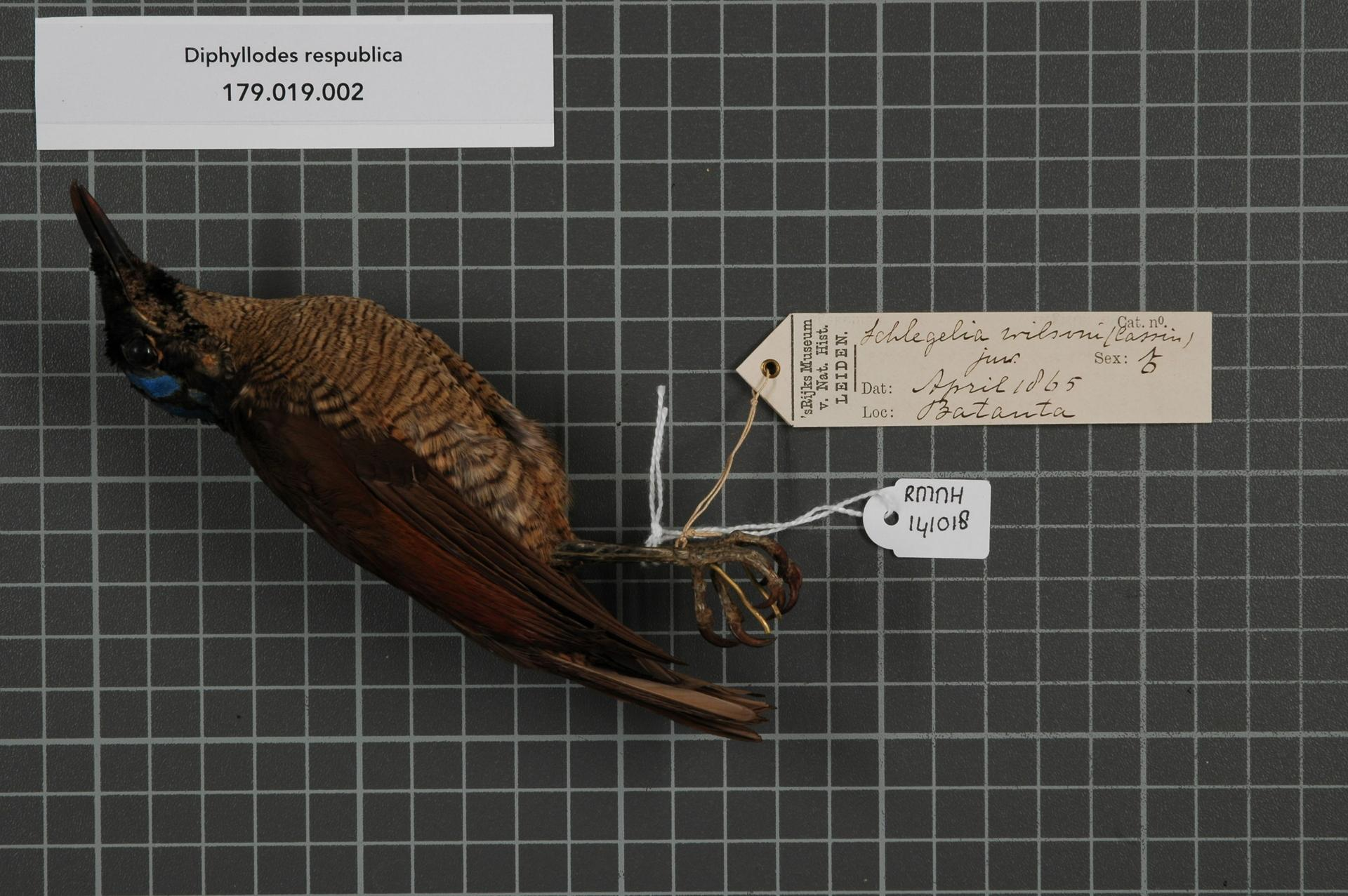 Diphyllodes respublica (Bonaparte, 1850)